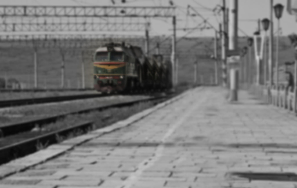 ст.Укурей